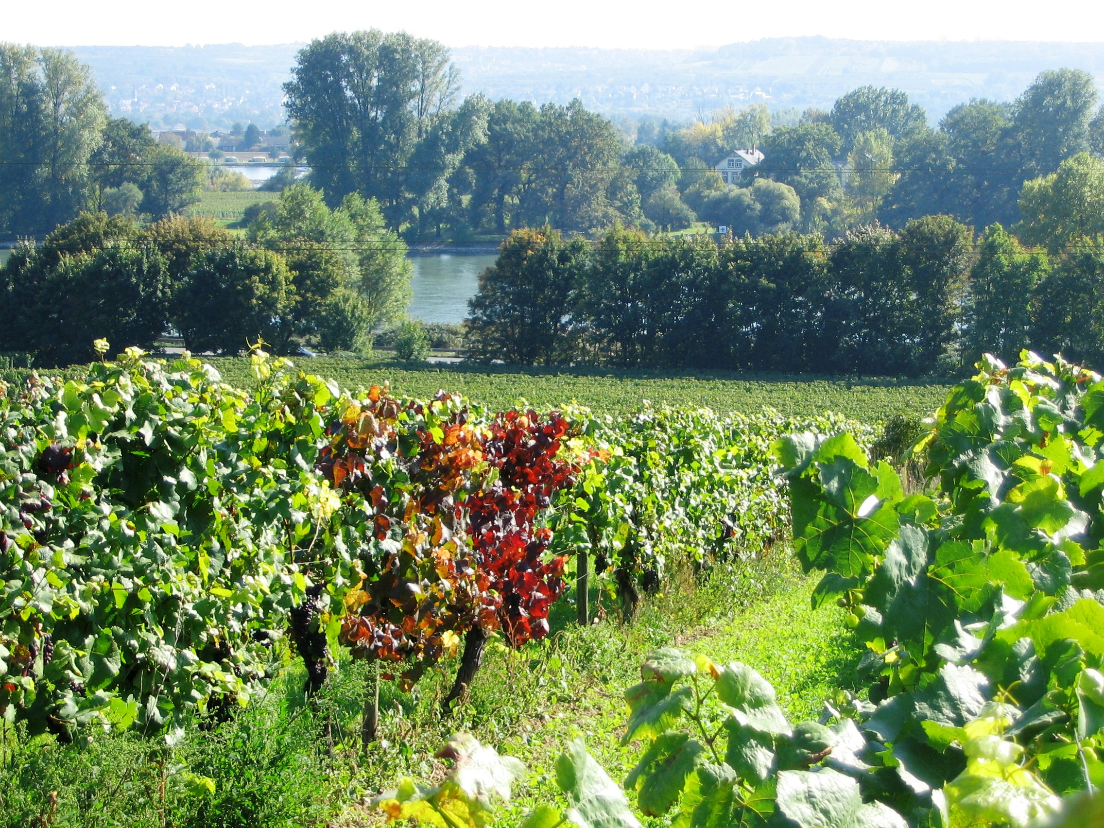 Blick aus den Weinbergen bei Erbach im Rheingau auf die Mariannenaue im Rhein. Die Insel ist hier etwa 250 Meter breit. Vorne ist die Kleine Gieß, in der die Hauptfahrrinne liegt. Hinter der Insel ist in einer Sichtschneise die Große Gieß zu sehen und das linke Rheinufer mit Heidenfahrt. Die Sichtschneise gibt den Blick frei auf die Weinberge, die auf der Insel angelegt sind. Ein Giebel des zur Bewirtschaftung der Insel dienenden Gutsgebäudes ist zwischen den Uferbäumen zu sehen.